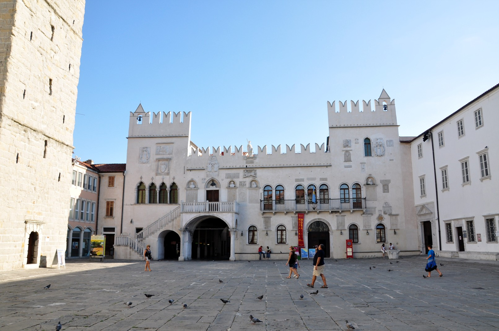 Prätorenpalast